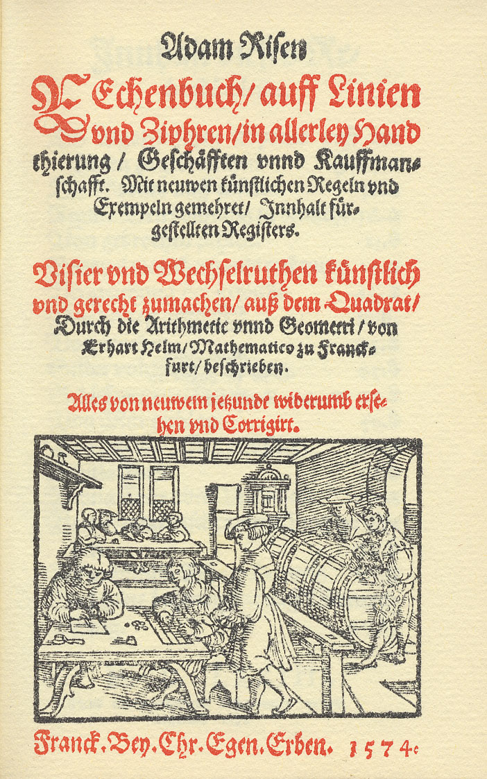 Transferred from de.wikipedia to Commons by Maksim. The original description page was here. All following user names refer to de.wikipedia. Adam Riesen Rechenbuch (Titelseite, 2. Ausgabe 1522)